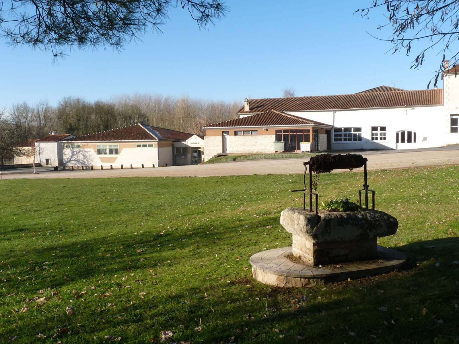 centre culturel et sportif de Luxé, Charente, France (inscription: JUDO MUSIQUE)